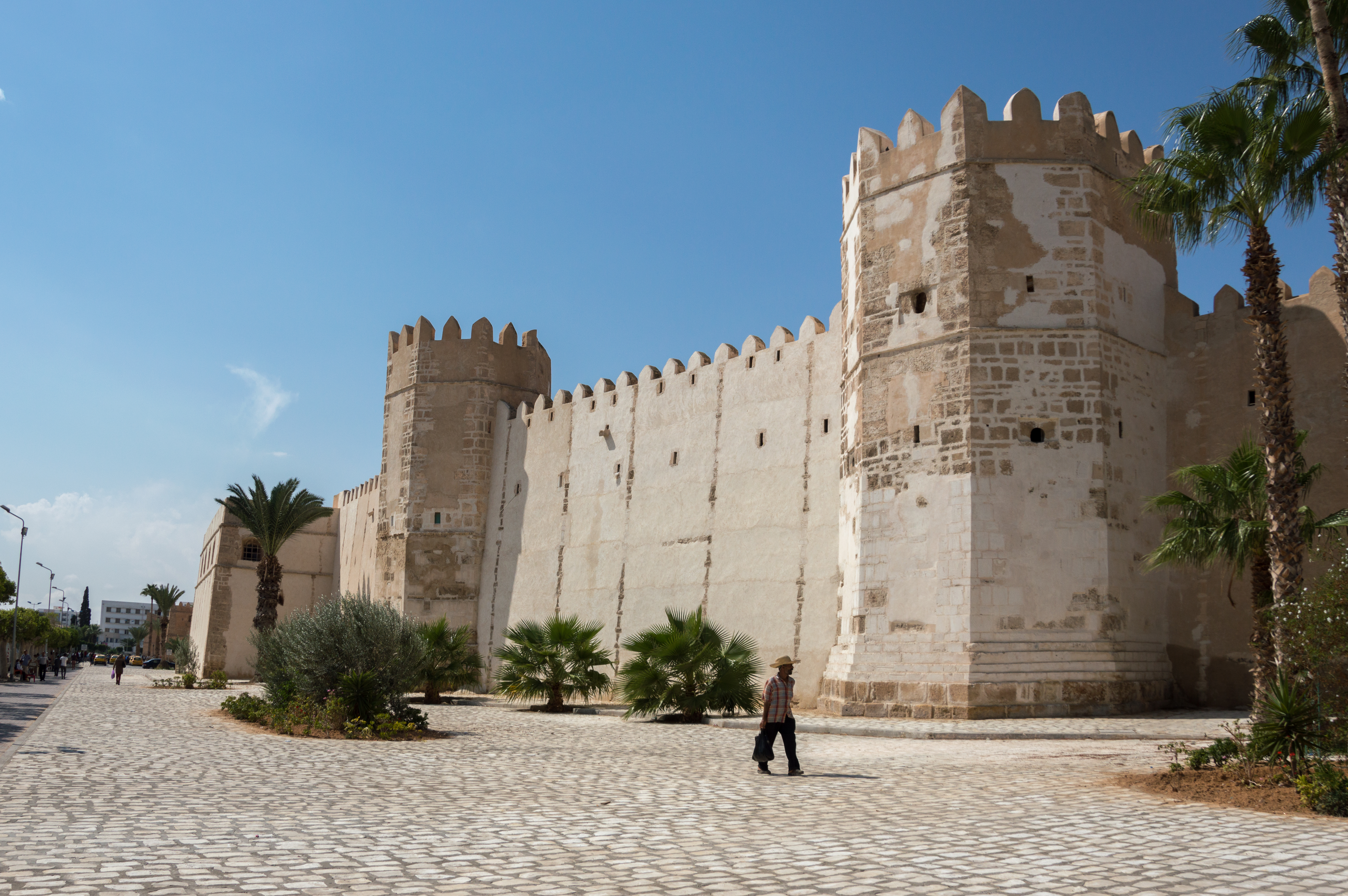 Remparts